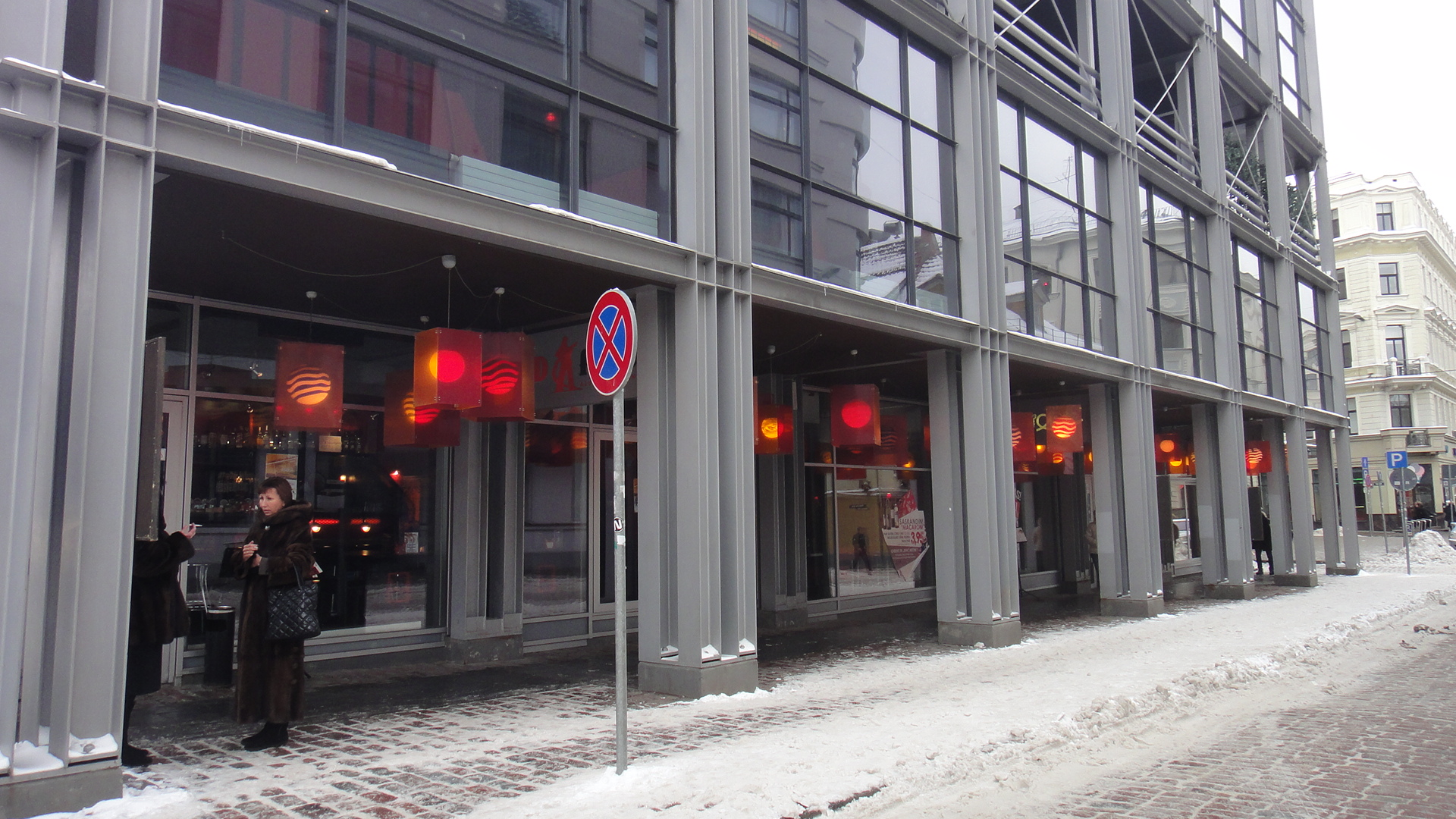 д. 14 на улице Аудею в Риге